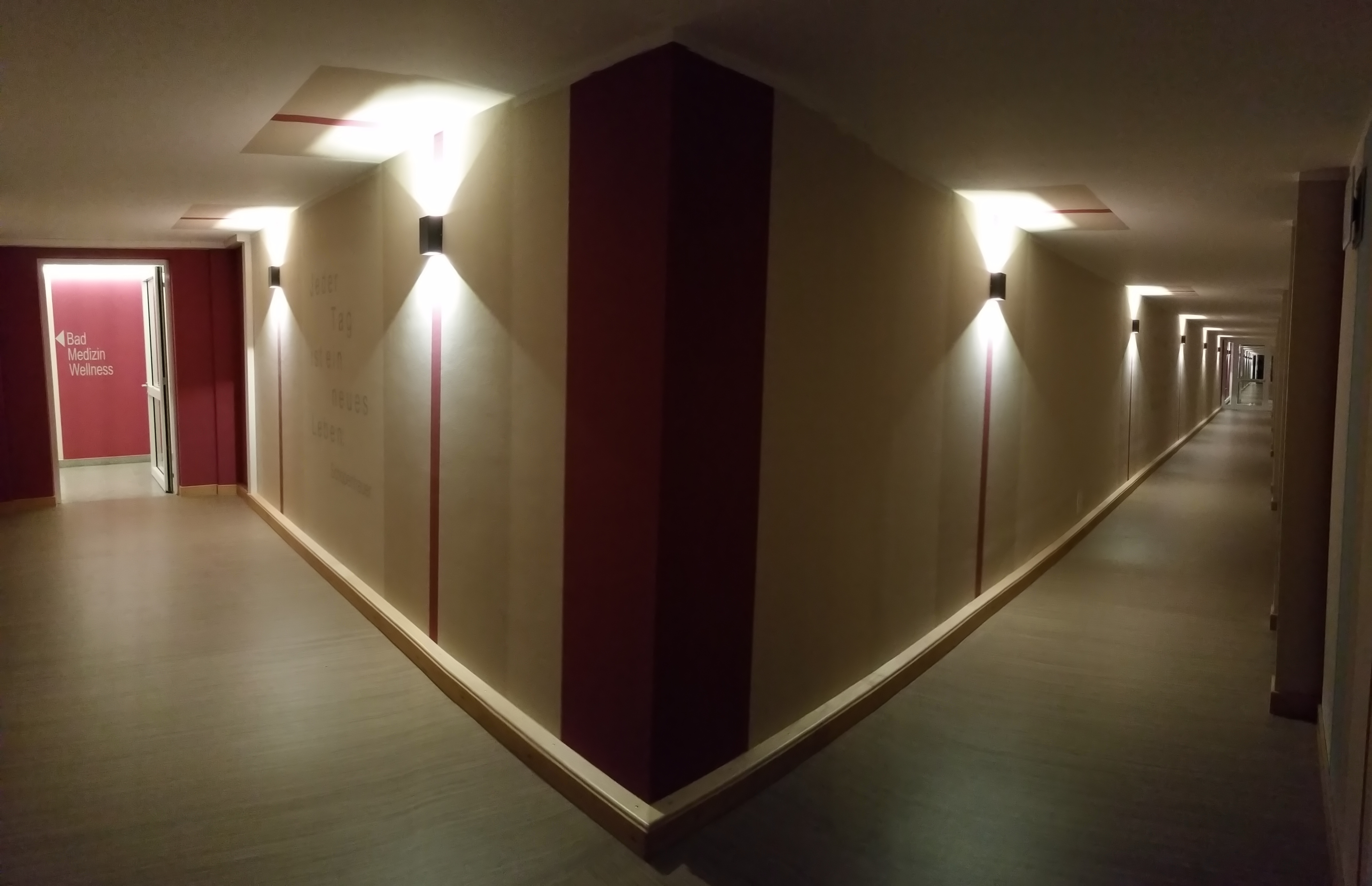 Deutschland, Bayern, Oberpfalz, Landkreis Tirschenreuth, Gemeinde Neualbenreuth, Der seit dem Dezember 2015 begehbare "Bademantelgang" zwischen dem Sibyllenbad und dem gleichfalls im Dezember eröffneten "Kurhotel Pyramide"